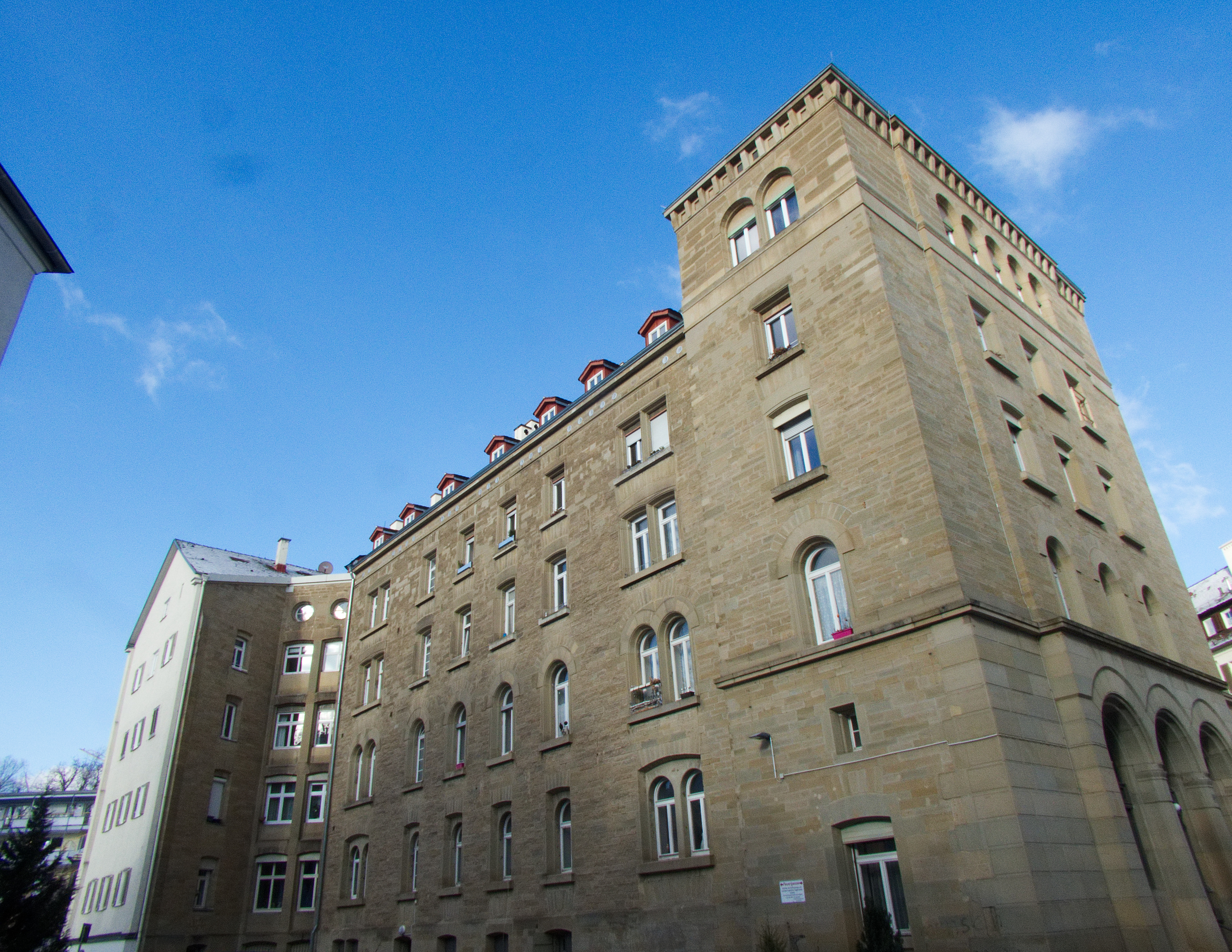 Ehemalige Pönitentiaranstalt Senefelderstr. 45 A, B, C, Stuttgart. Erbaut 1844-50 im Neorenaissance-Stil. Geschützt nach § 2 DSchG.